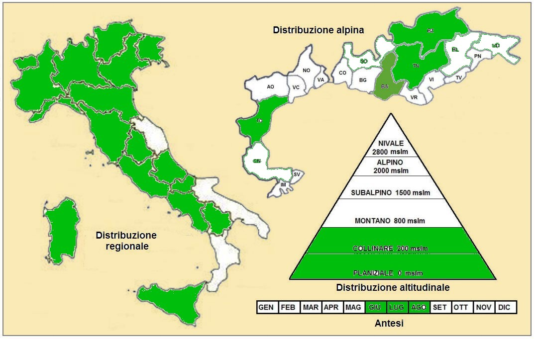 Ranunculus lingua - Distribuzione